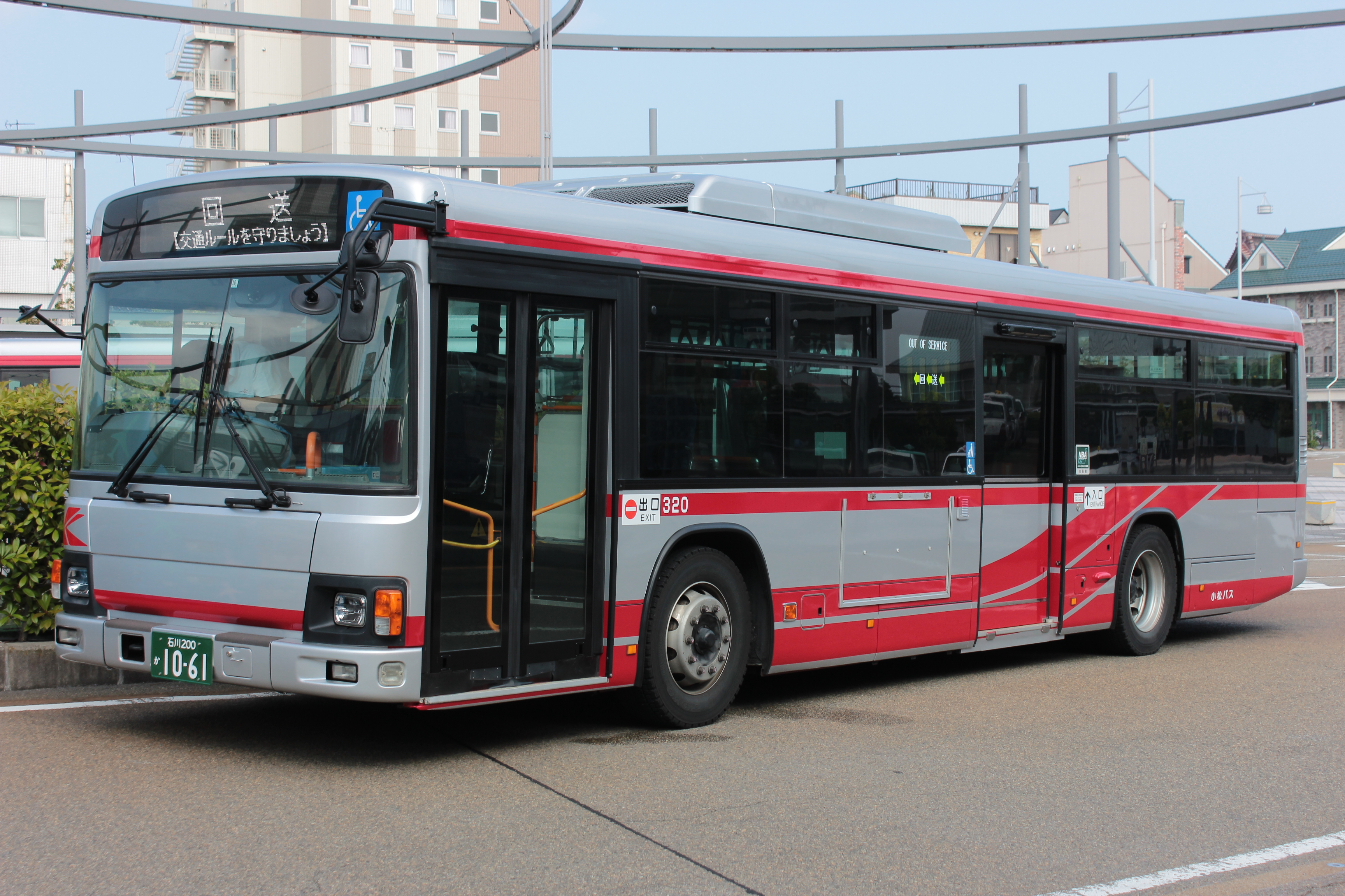 小松バスの車両（標準塗装） Canon EOS Kiss X5